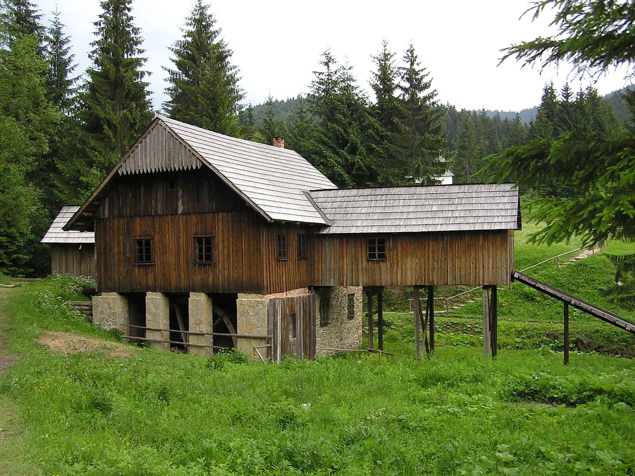 Museum Vychylovka, Slovakia